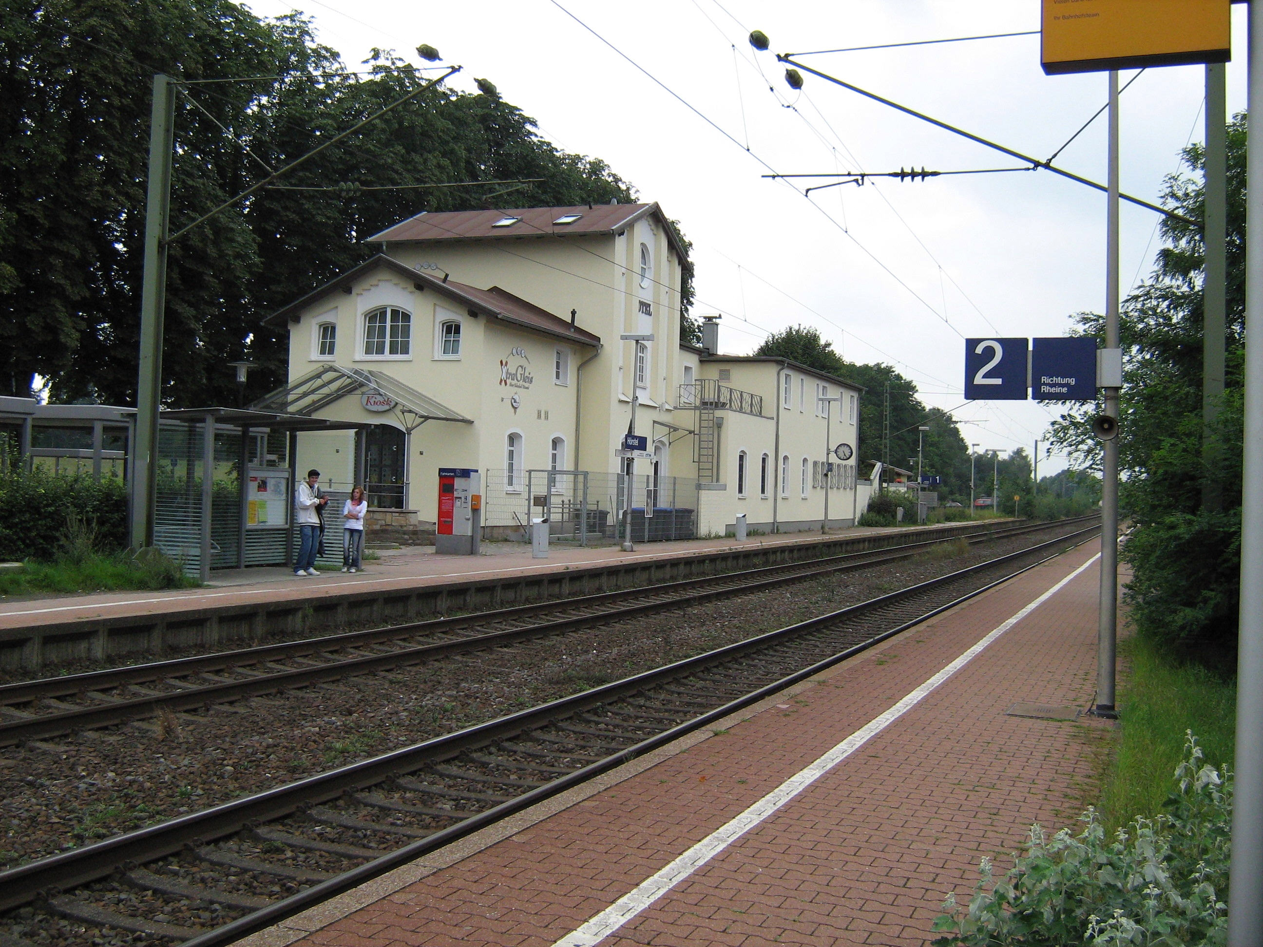 Ehemaliger_Bahnhof_Hörstel_hinten (NRW)